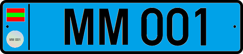 Автомобильные номера МВД Приднестровья